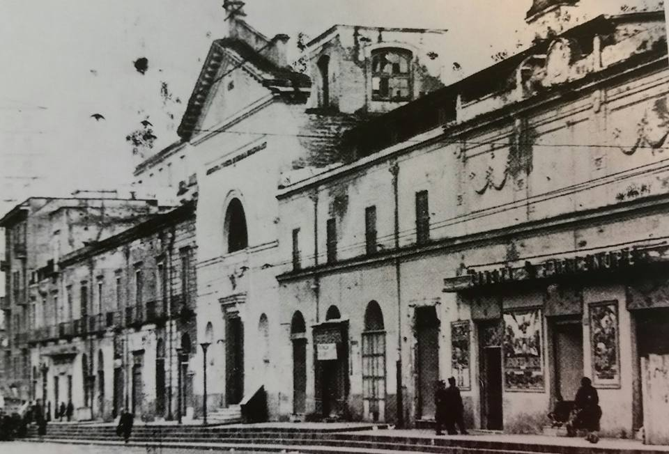 Napoli, Piazza Cavour - Chiesa di Santa Maria delle Grazie e Cinema Partenope. Autore sconosciuto.